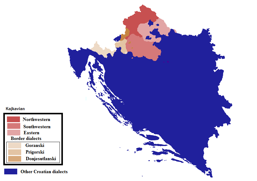 Kajkavski dijalekti (grupirani)